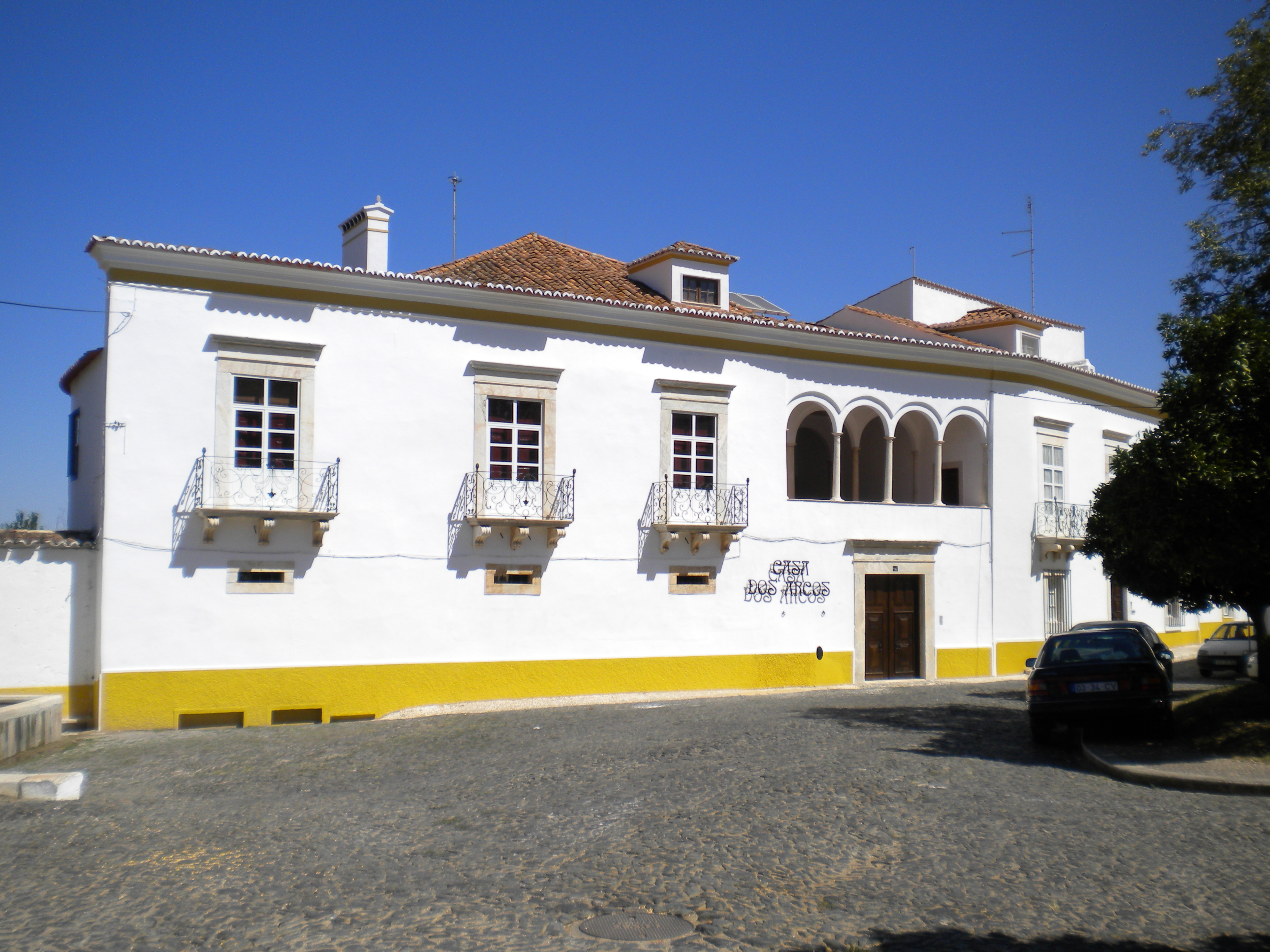 Palácio Matas Azambuja ou Casa dos Arcos em Vila Viçosa